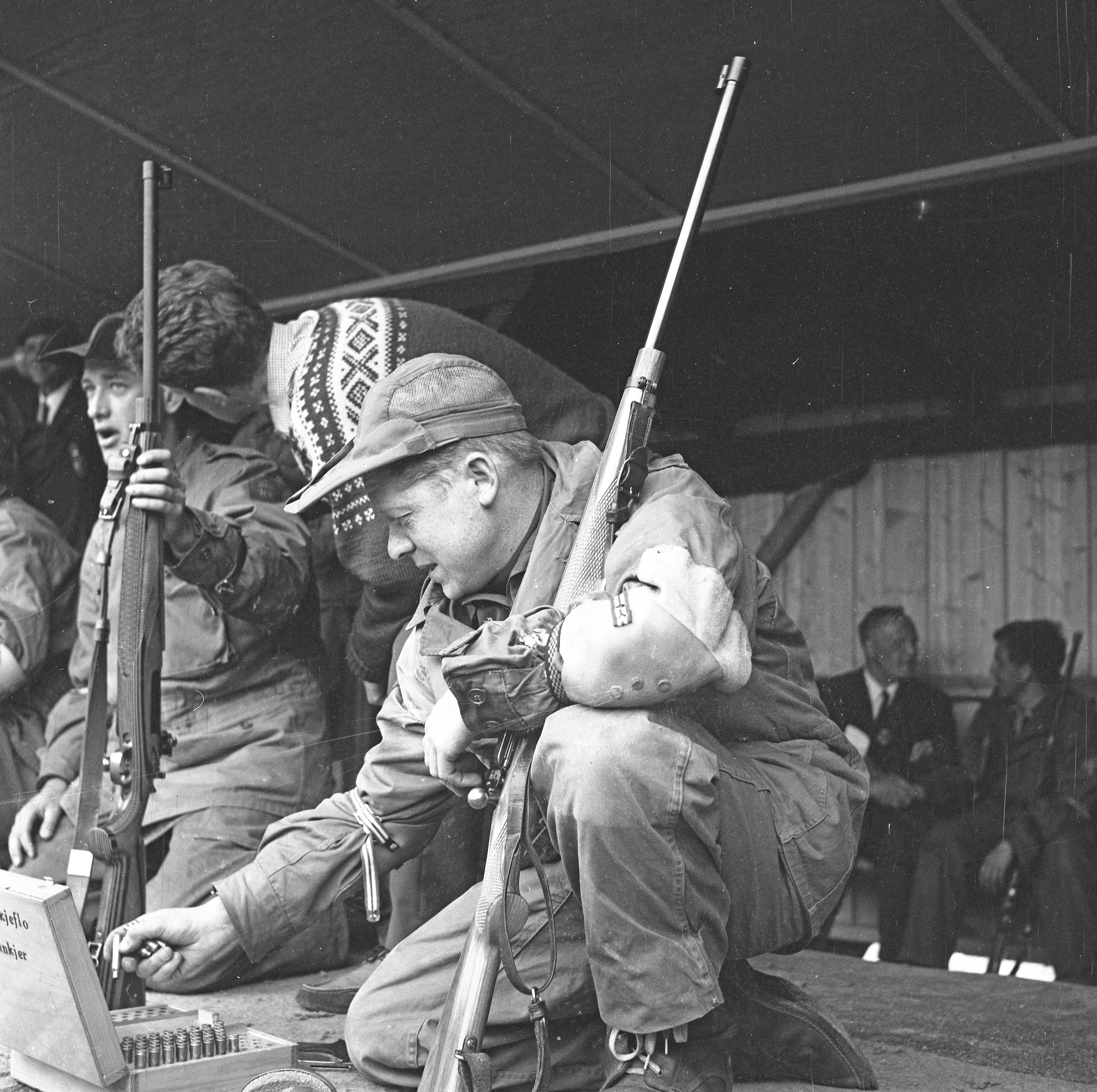 Format: Negativ 120 film Dato / Date: 5 September 1969? 1972? Fotograf / Photographer: Eirik Sundvor (1902 - 1992) Sted / Place: Ulven ved Bergen? Wikipedia: Arve Skjeflo (1940 - 1985) Wikipedia: Skytterkonge Lenke / Link: Det frivillige Skyttervesen (dfs.no) Eier / Owner Institution: Trondheim byarkiv, The Municipal Archives of Trondheim Arkivreferanse / Archive reference: Tor.H43.Bxx.F14410 Merknad: Arve Skjeflo fra Steinkjer ble skytterkonge i Ulven i 1972.